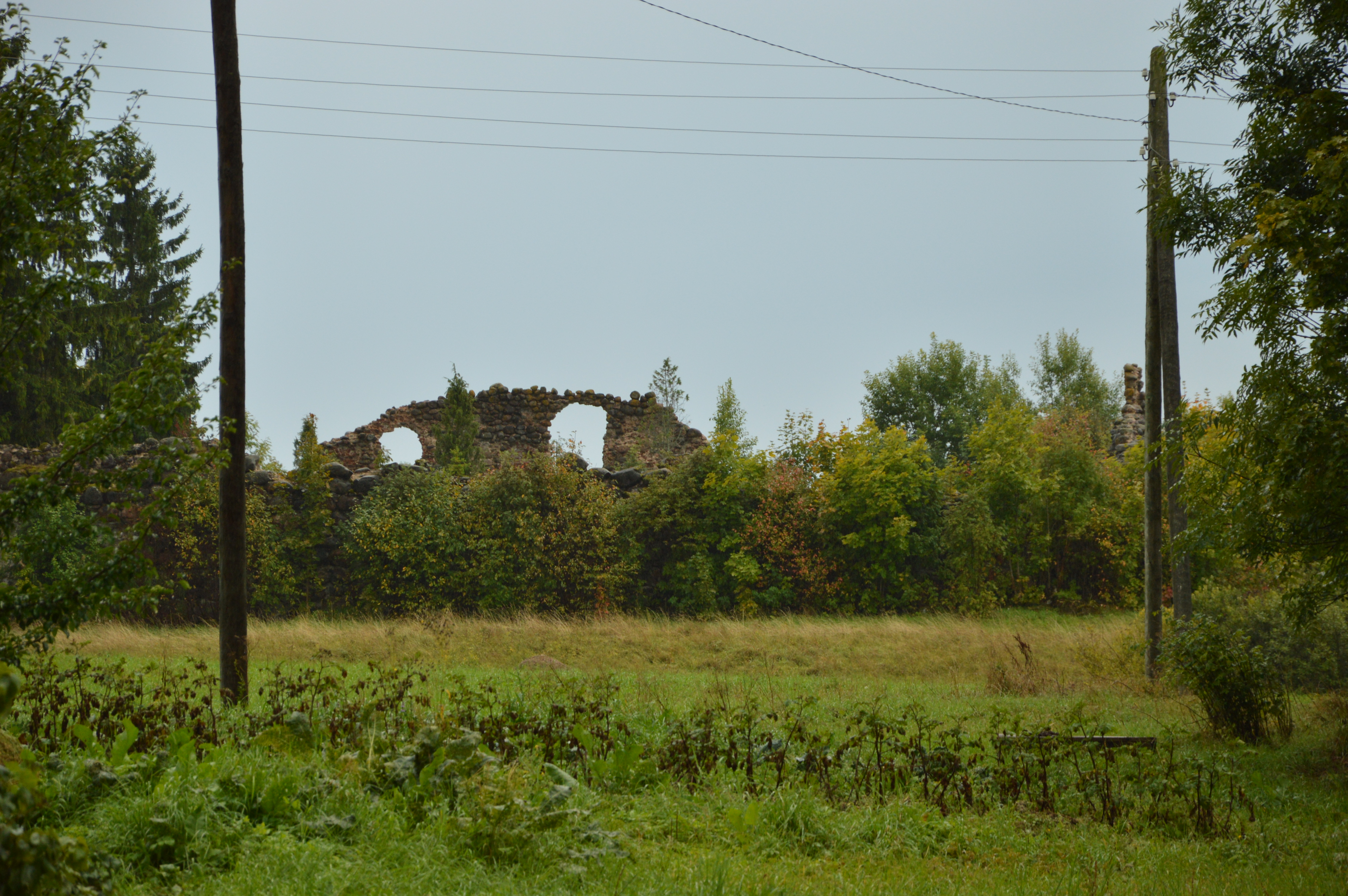 Vana-Pebalgi piiskopilinnus vaadatuna kiriku kõrvalt.